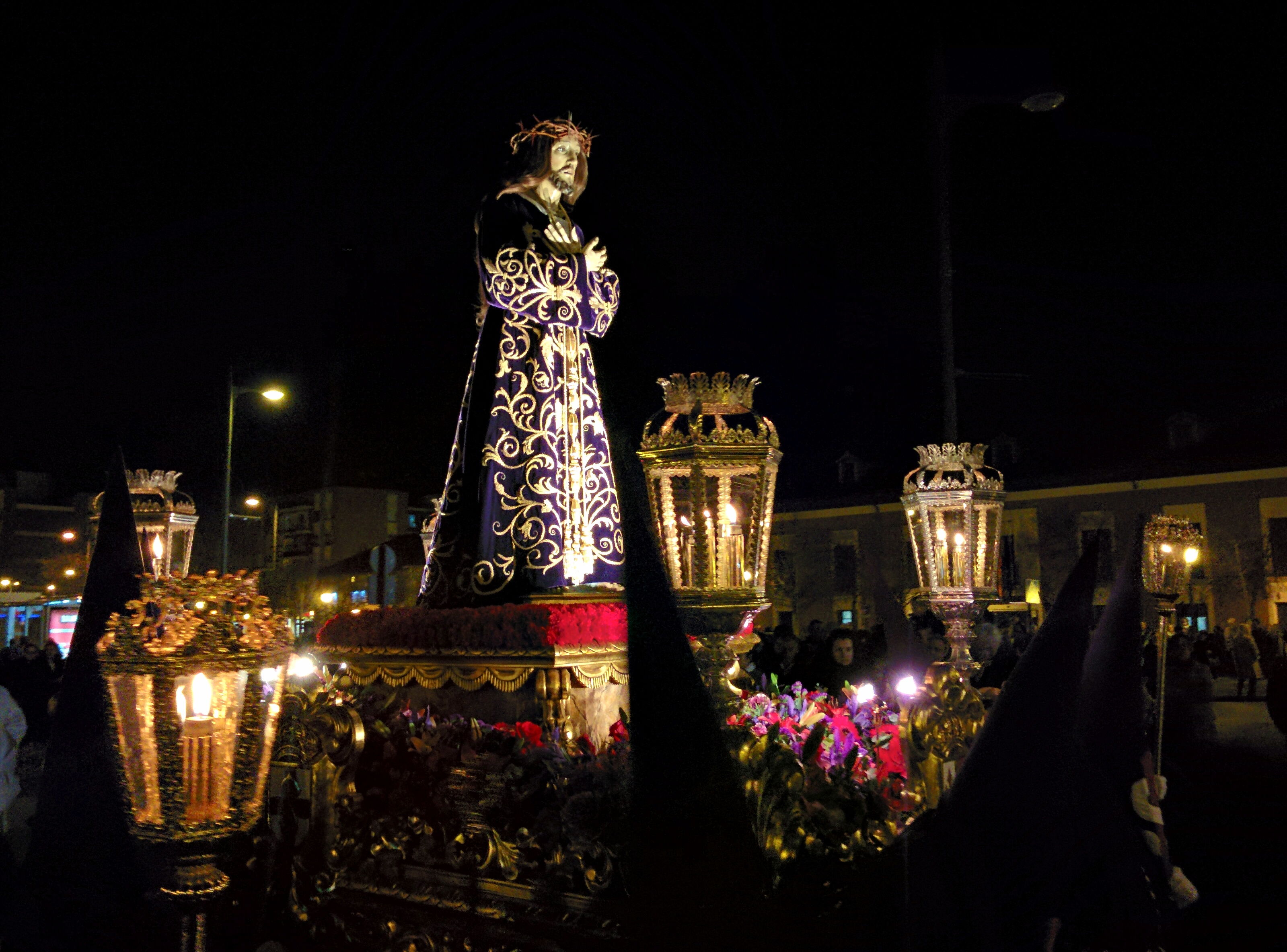 Procesión del Miércoles Santo. Archicofradía de Nuestro Padre Jesús Nazareno, Aranjuez (Madrid, España). This is a photography of a Folklore festival in Spain (Wikidata id Q47119796).